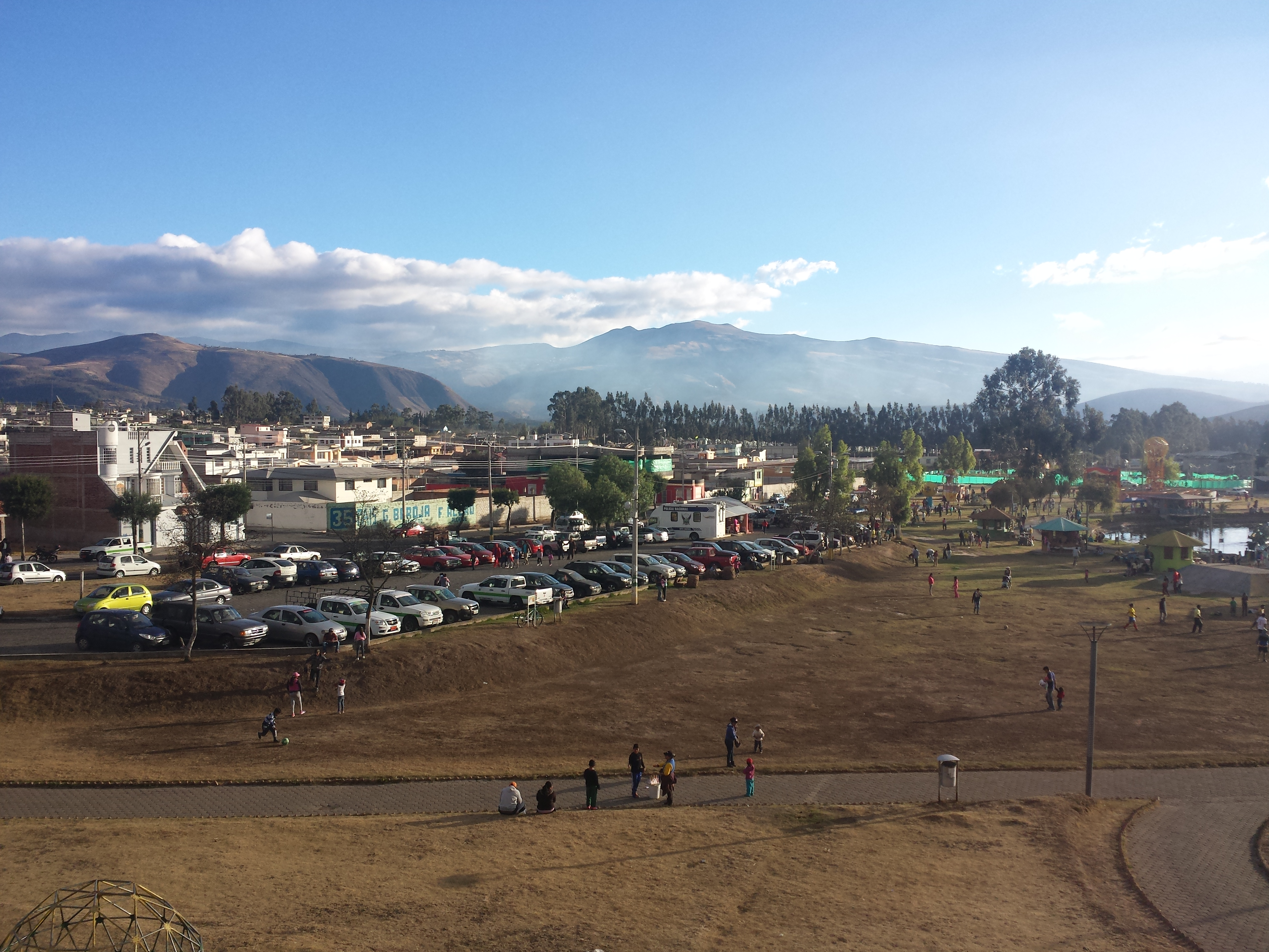 Vista del parque yasnán en la parroquia de Juan Montalvo.